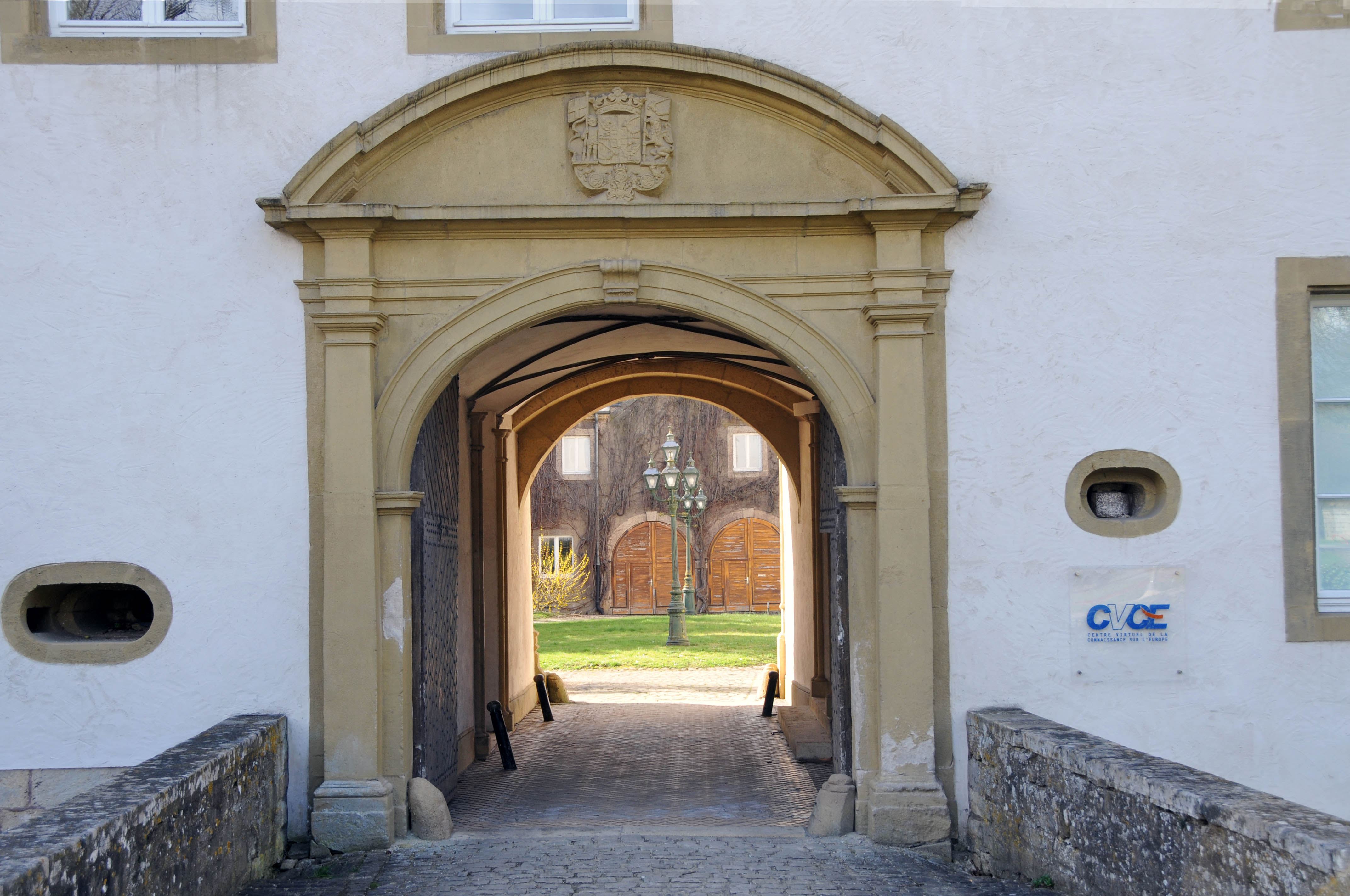 L'entrée du château de Sanem (Luxembourg)